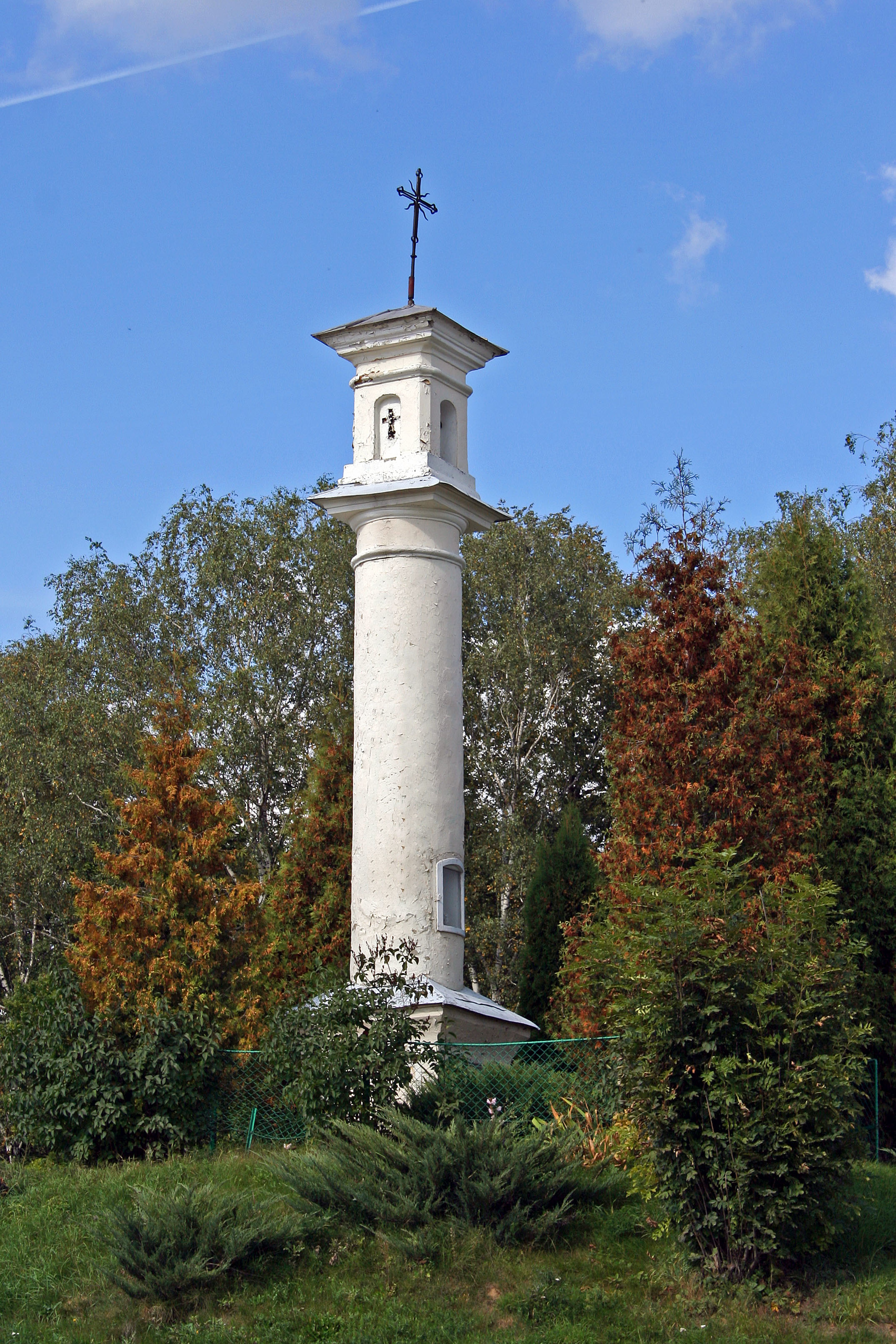 Obelisk z krzyżem na mogile Konfederatów barskich w Brzozowie.